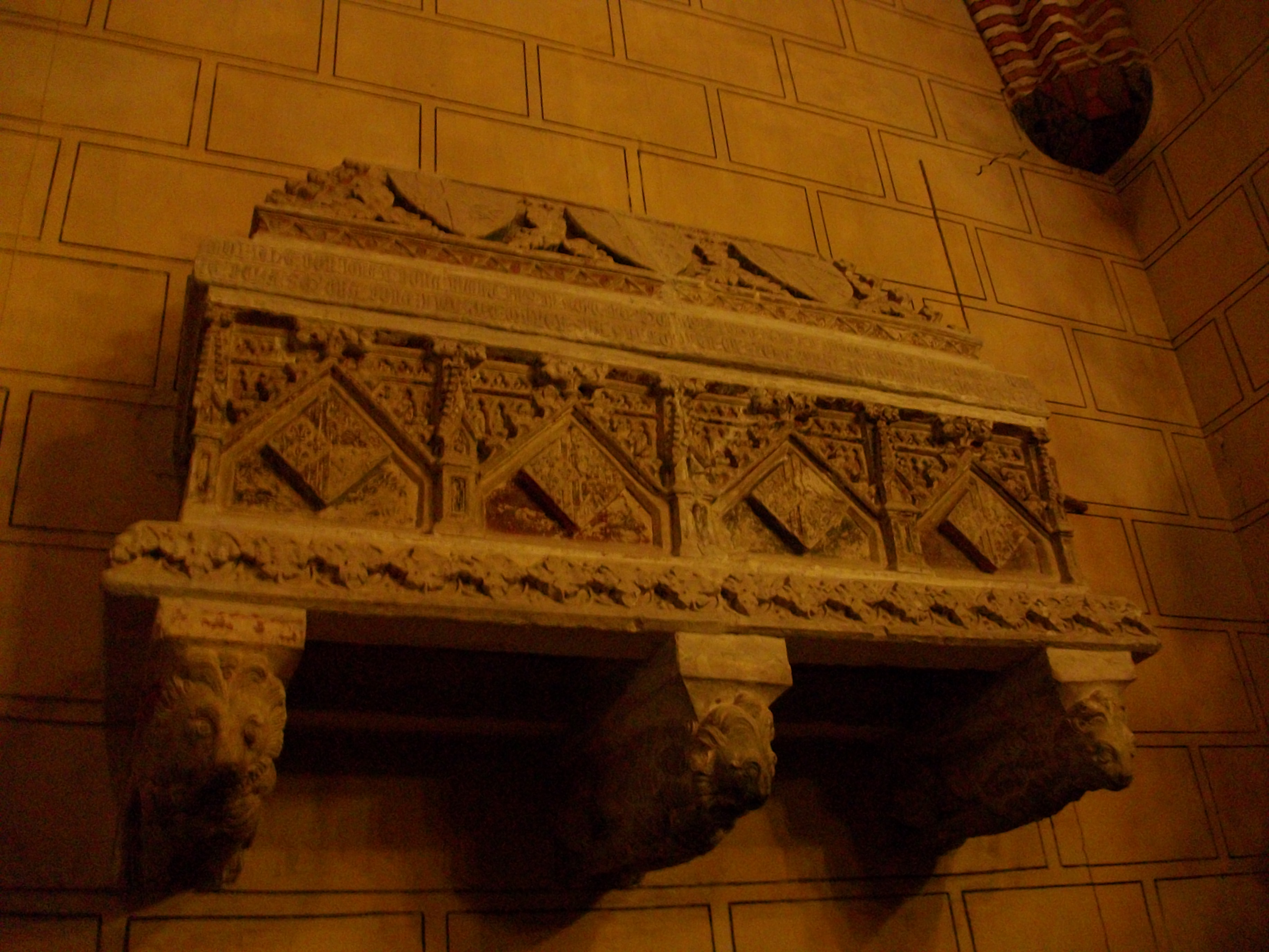 Sarcòfag que conté les restes dels fills d'Alfons el Vell, Sant Jeroni de Cotalba.